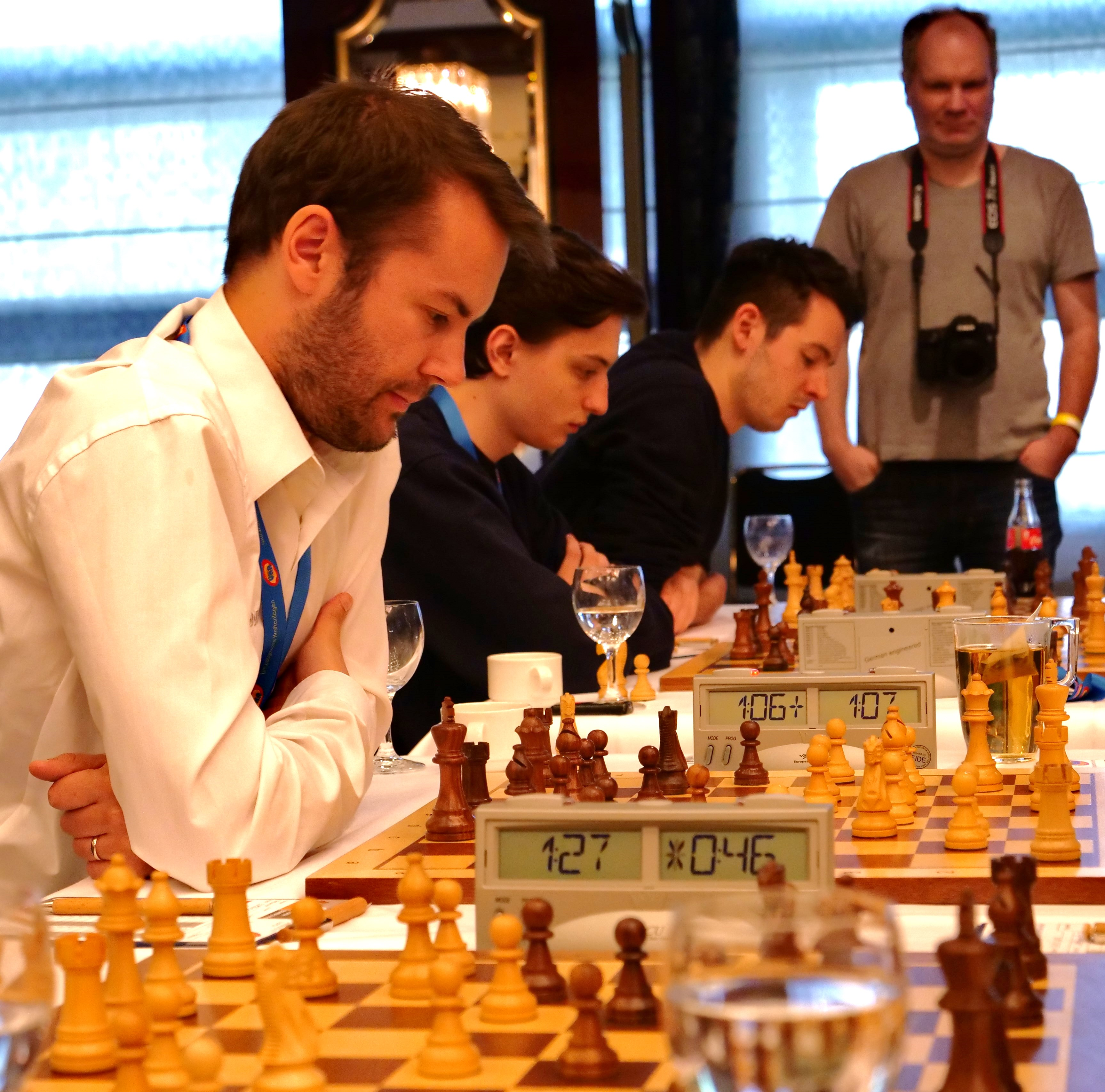 Saric, Kollars und Huschenbeth in der Bundesliga-Endrunde 30-4-2018